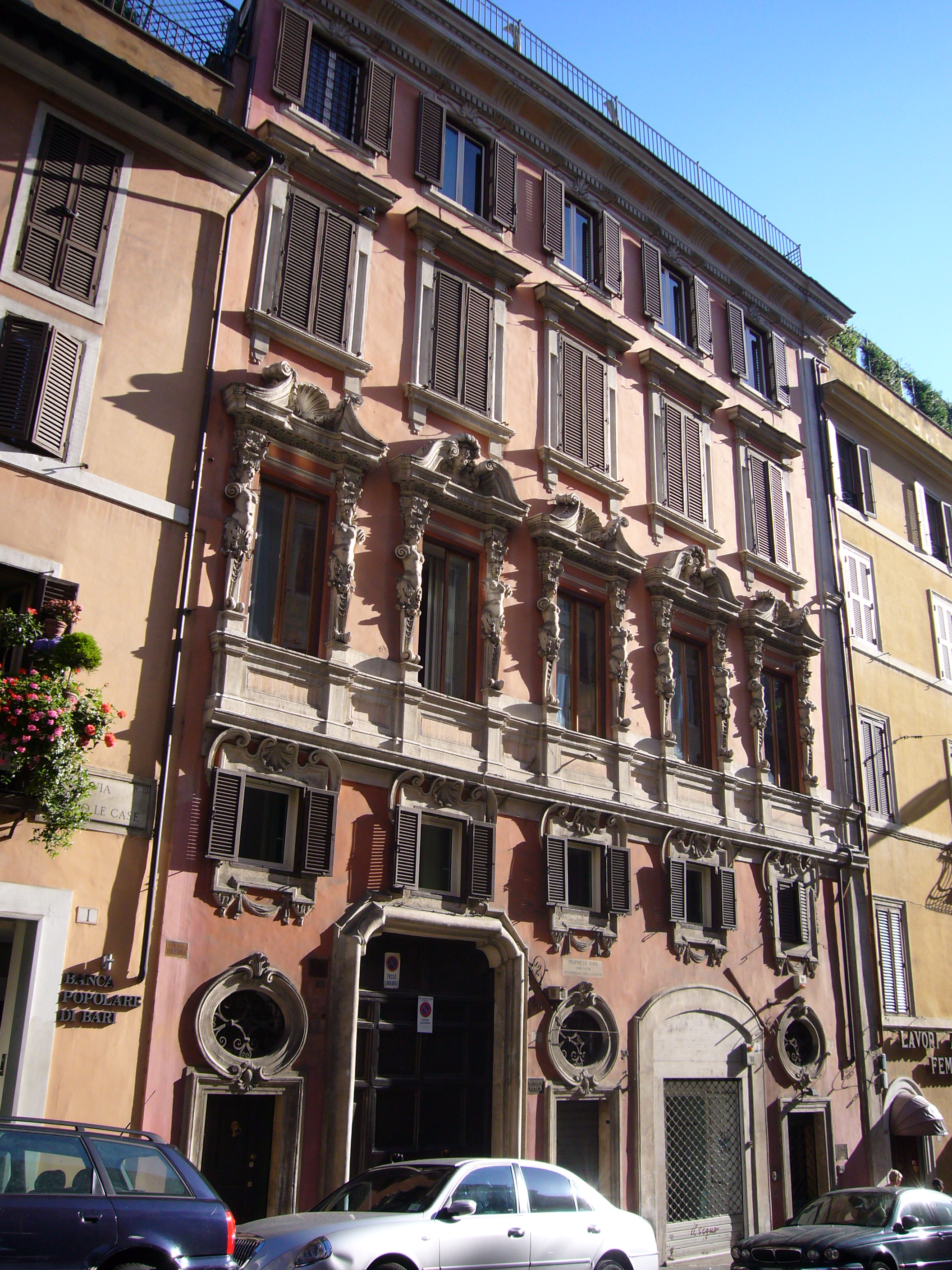 Roma, via Capolecase: palazzo Toni (detto anche "dei pupazzi")